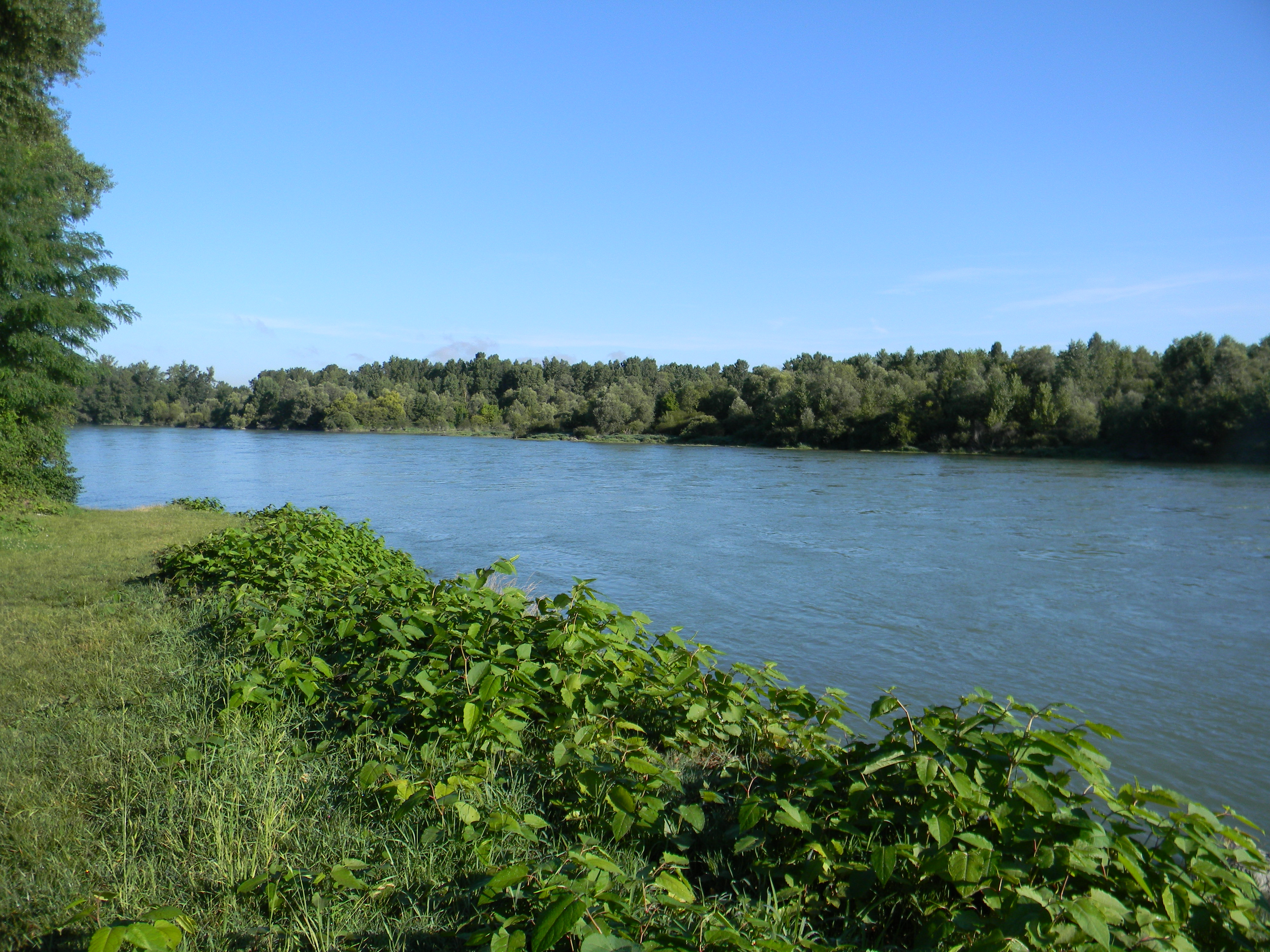 Le Rhône à Anthon, après la confluence des fleuves Ain et Rhône.